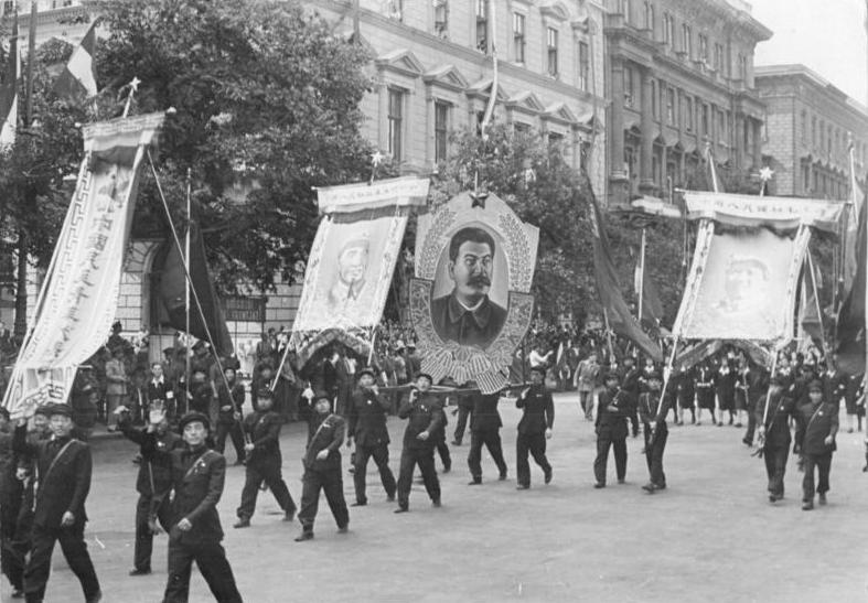 Budapest, II. Weltfestspiele, Festumzug, chinesische Delegation Weltjugendfestspiele in Budapest. UBz: Chinesische Delegation in der grossen Schlussdemonstration am 28.8.49.August 1949-Leu